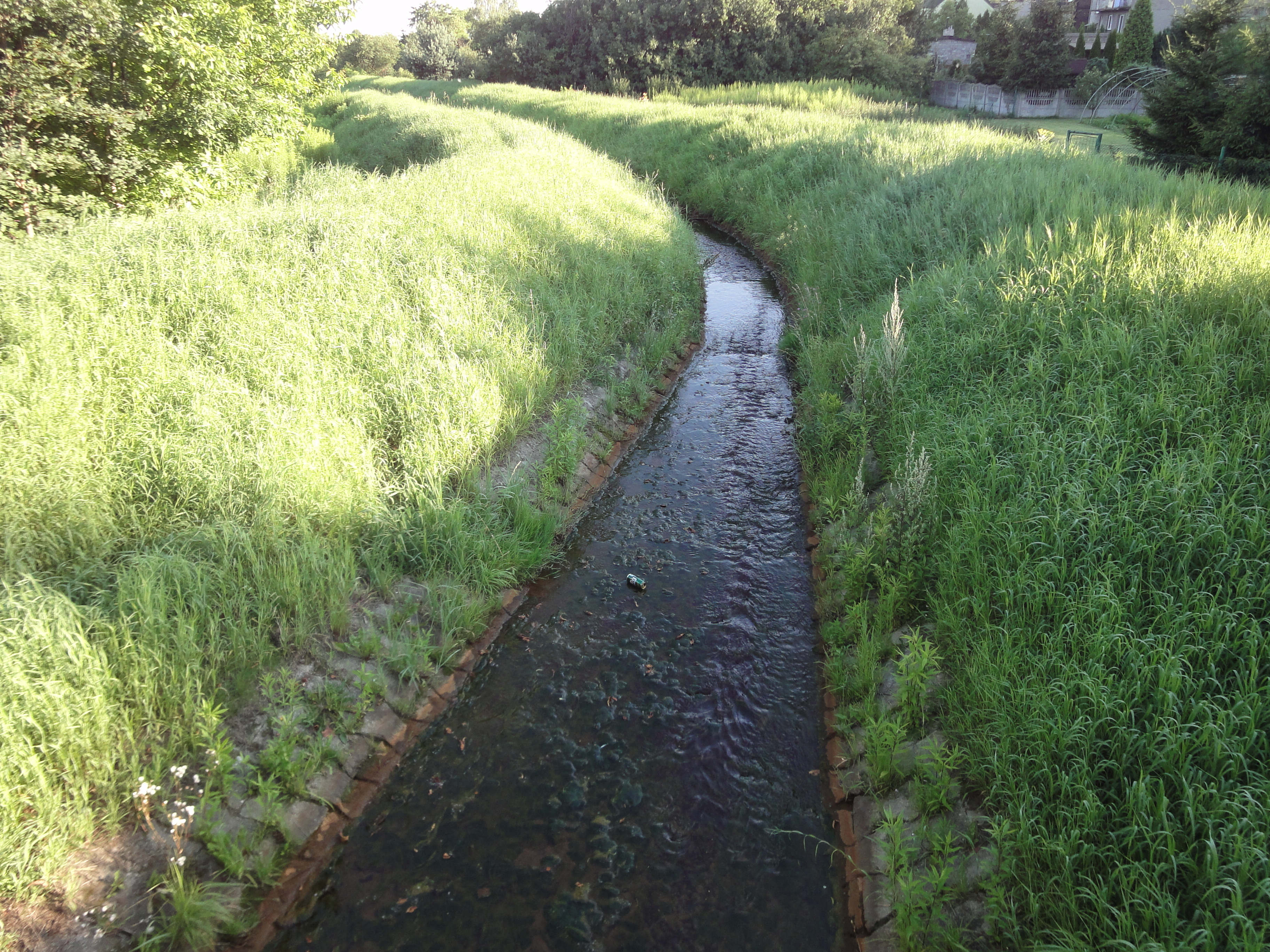 Zdjęcie przedstawia dopływ rzeczki Welonki do rzeki Brynicy na pograniczu Wojkowic i Siemianowic Śląskich